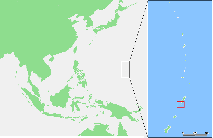 Mariana Islands - Aguijan.PNG